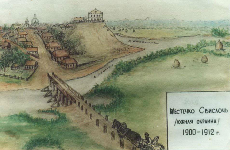 Беларуская (тарашкевіца): Сьвіслач (Śvisłač)